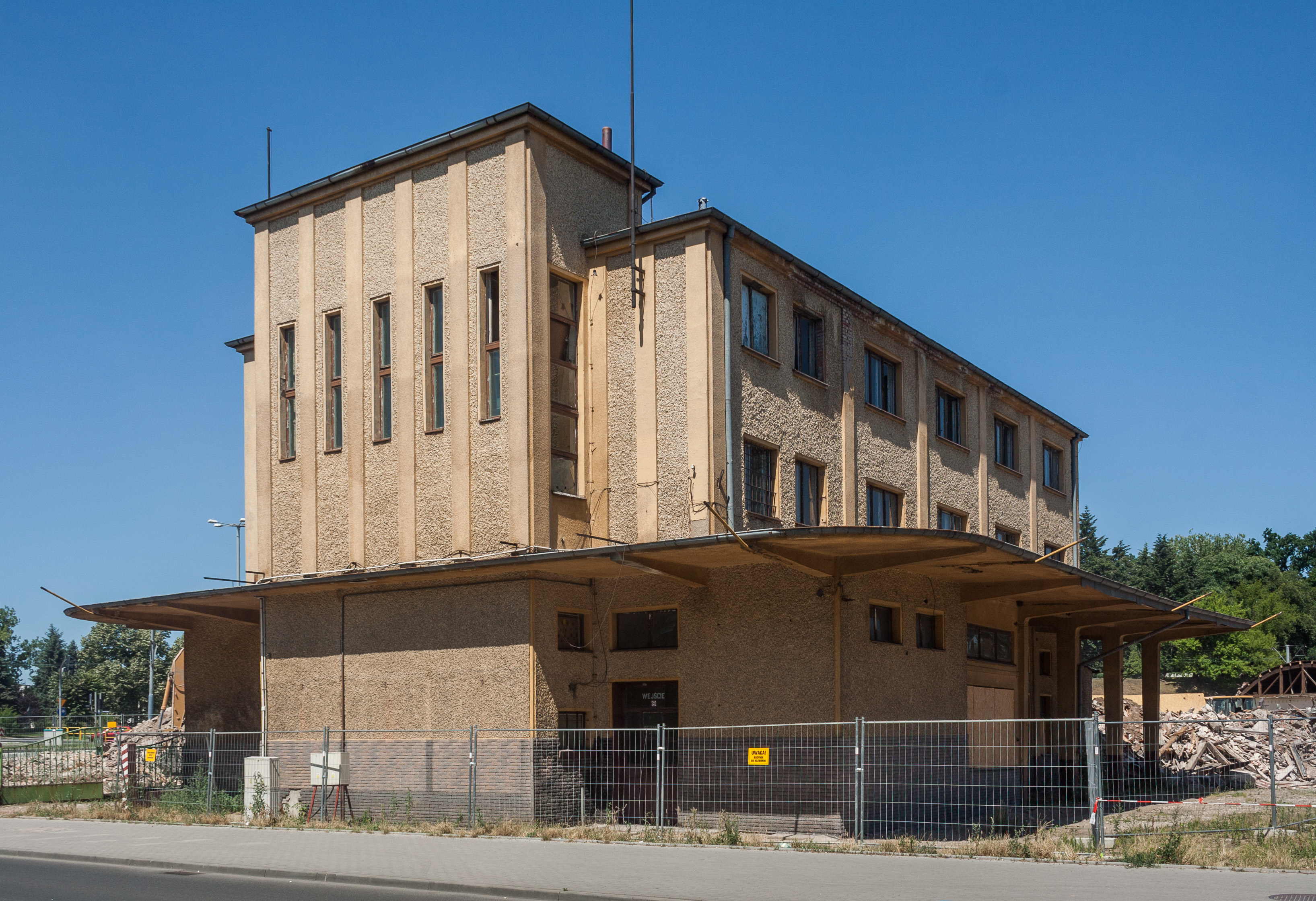 Toruń, nieistniejący dworzec PKS, projektu Zbigniewa Wahla. Widok od strony południowej.